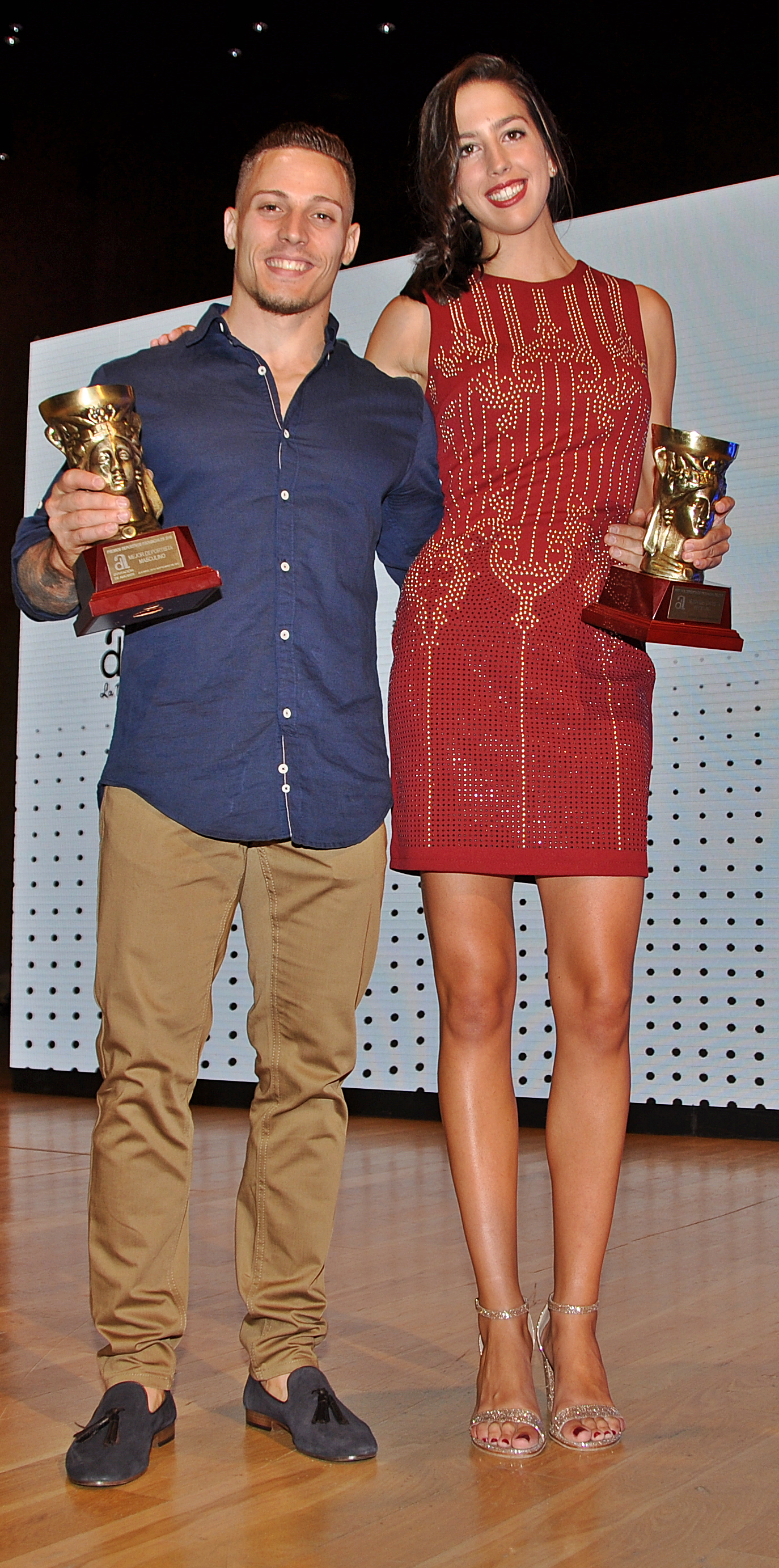 Néstor Abad y Alejandra Quereda en la XXIV Gala Provincial del Deporte de Alicante celebrada el 22 de septiembre de 2017, donde recibieron el premio a mejor deportista masculino y femenina de 2016.